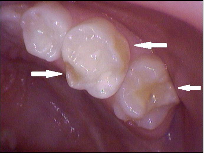 Colración característica de la lesion de hipoineralización.